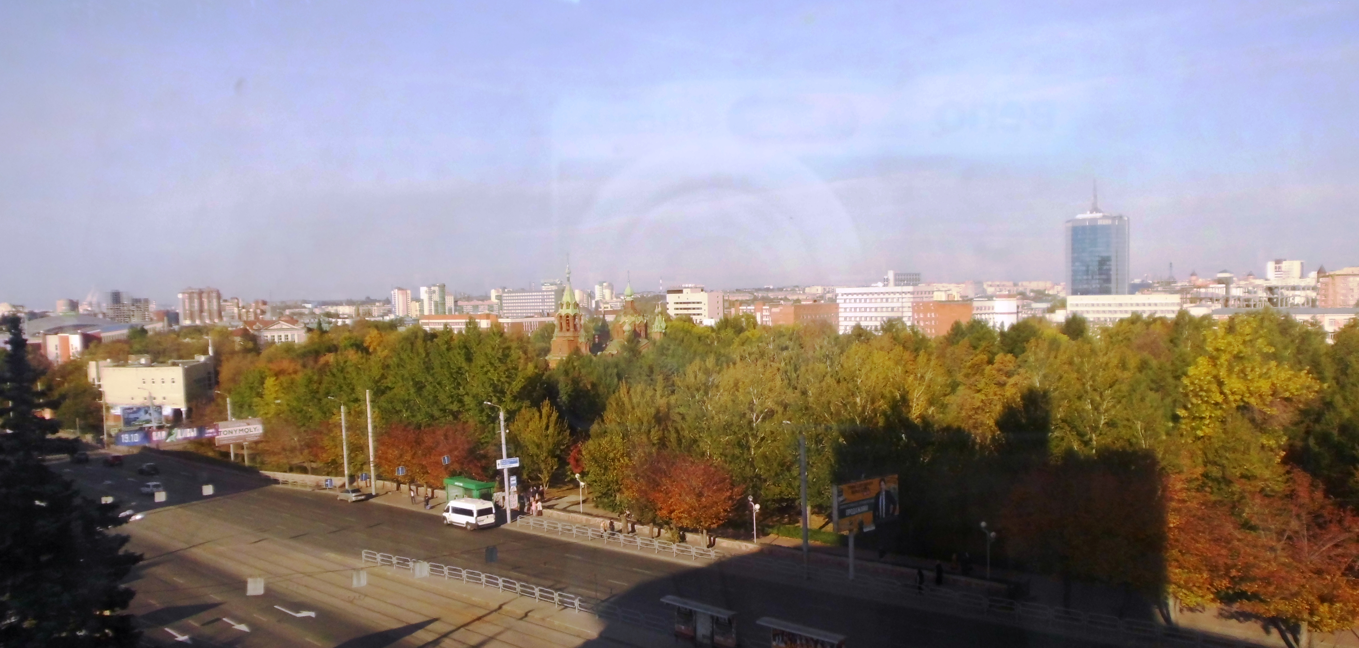 Исторические место, парк «Алое поле»: Алое поле, Челябинск, Челябинская область. Северная и центральная части, вид со стороны проезжей части Свердловского проспекта. По центру - Александро-Невская церковь, слева - Дворец пионеров. Слева на дальнем плане - ДС "Юность" и "Торговый центр", справа на дальнем плане высотное здание - "Челябинск-Сити".